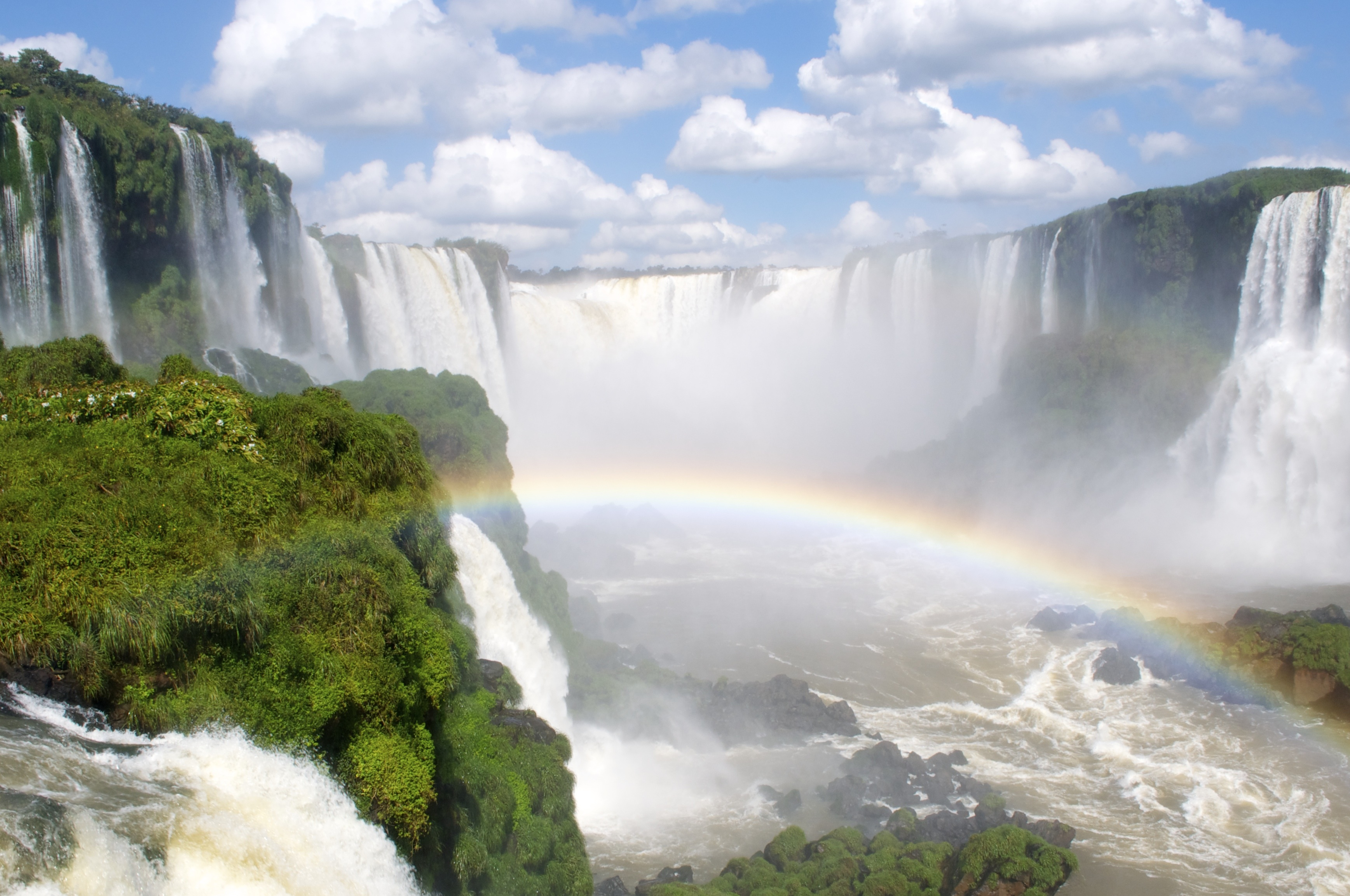 Wasserfälle von Iguacu aus der brasilianischen Seite